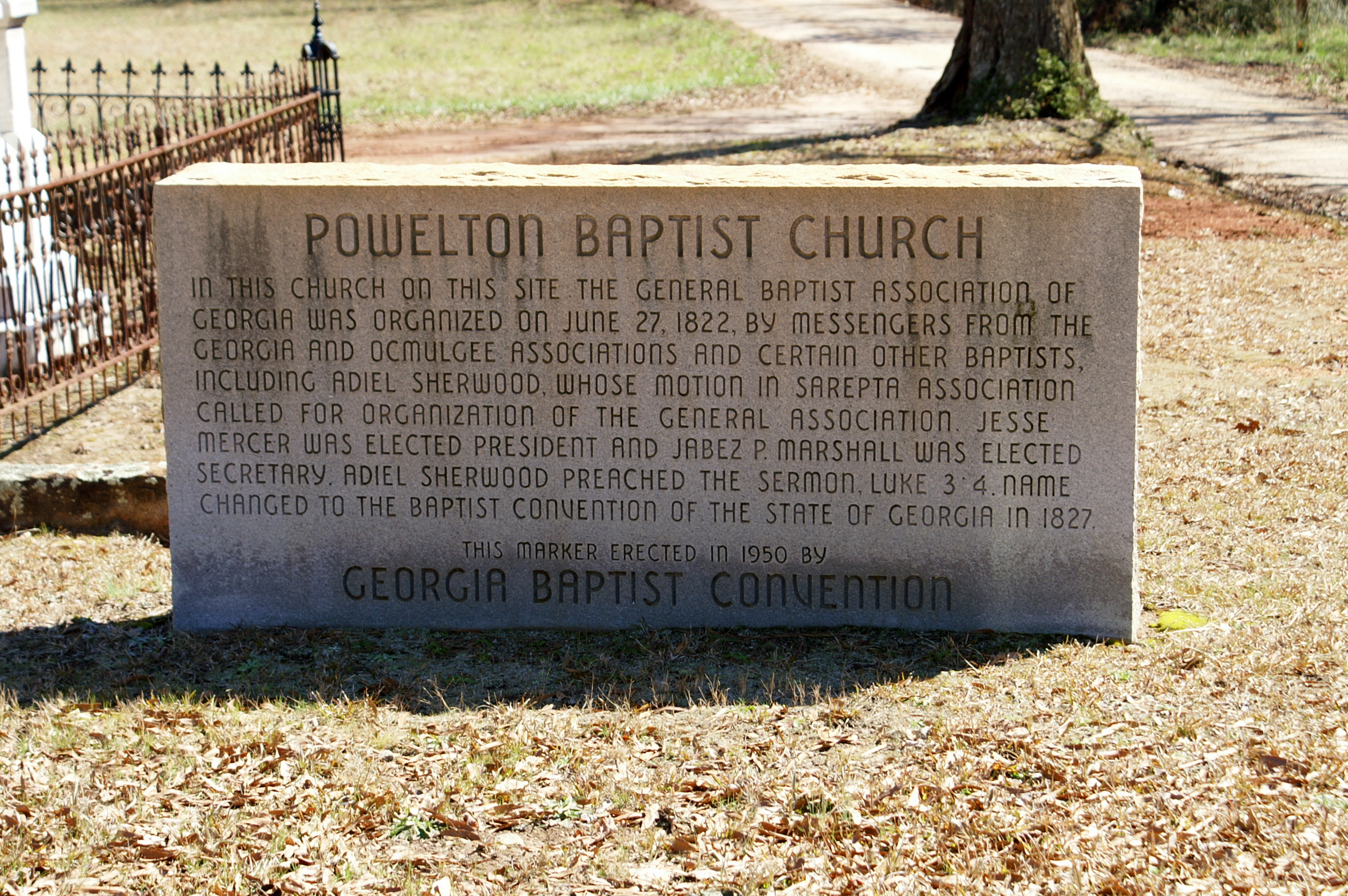 Powelton Baptist Church